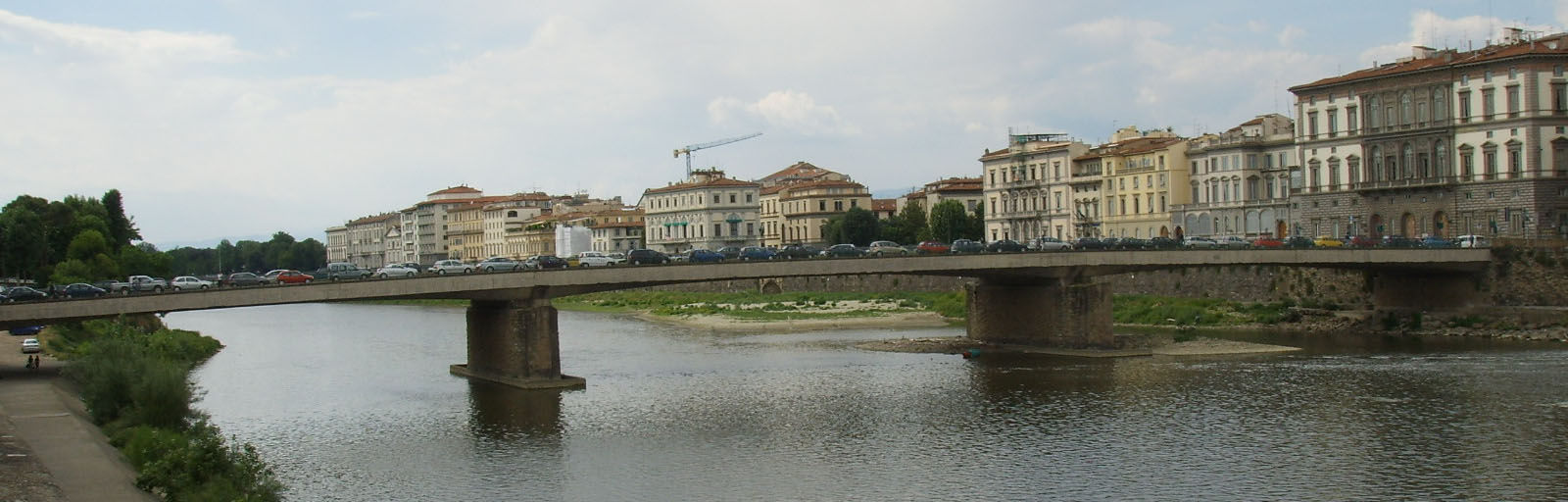 Ponte Amerigo Vespucci, Florence, Italy